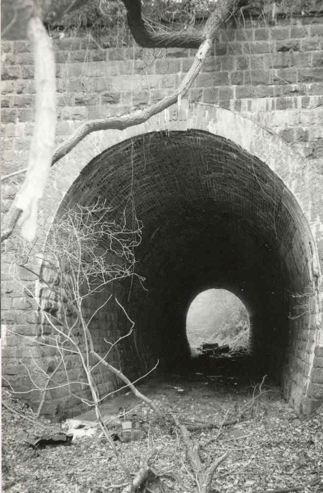 Der Sirrenbergtunnel der Kleinbahn Bossel-Blankenstein in Obersprockhövel, auch „Tunnel Kleine Windmühle“ genannt